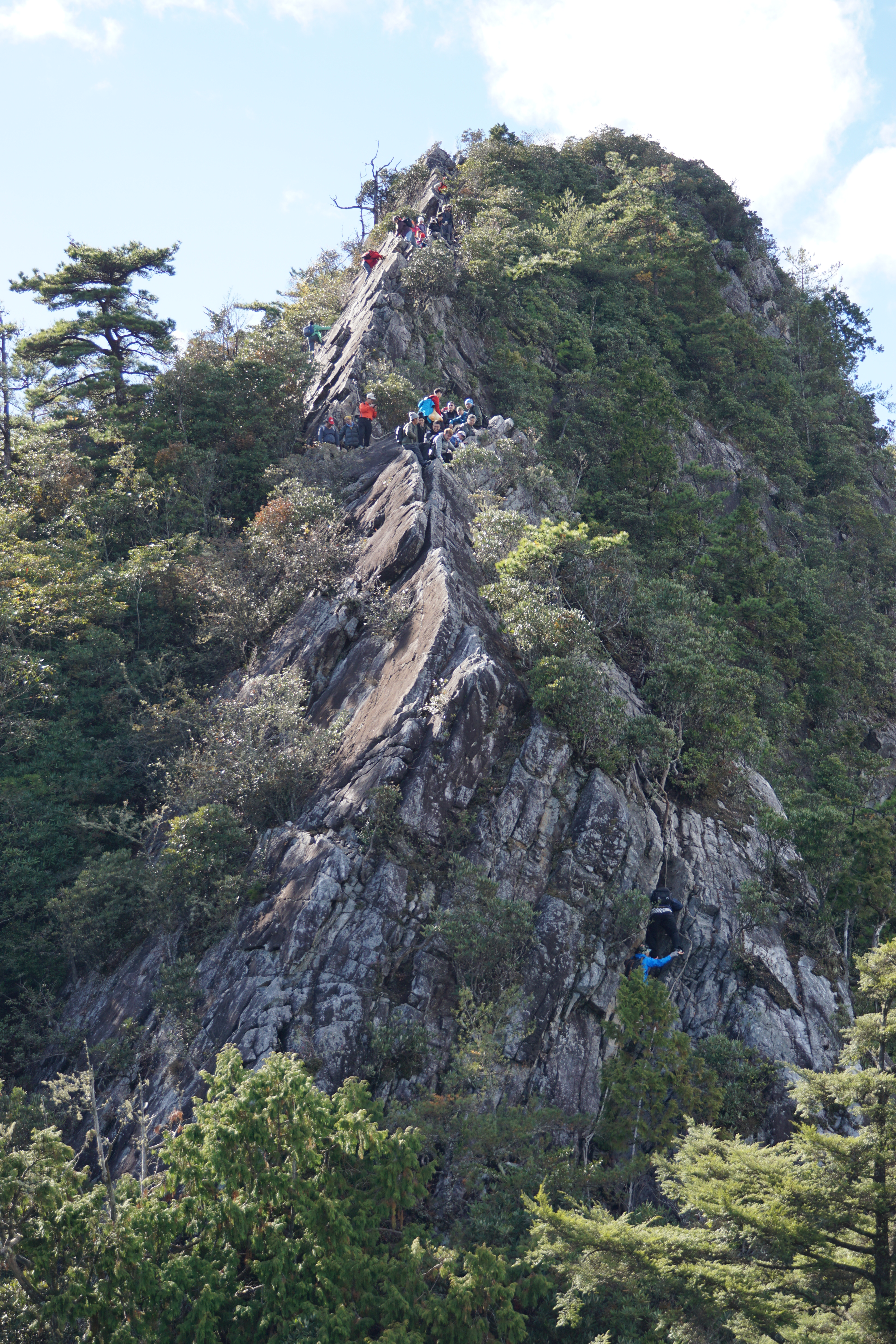 鳶嘴山山頂旁稜線，登山客排隊下山